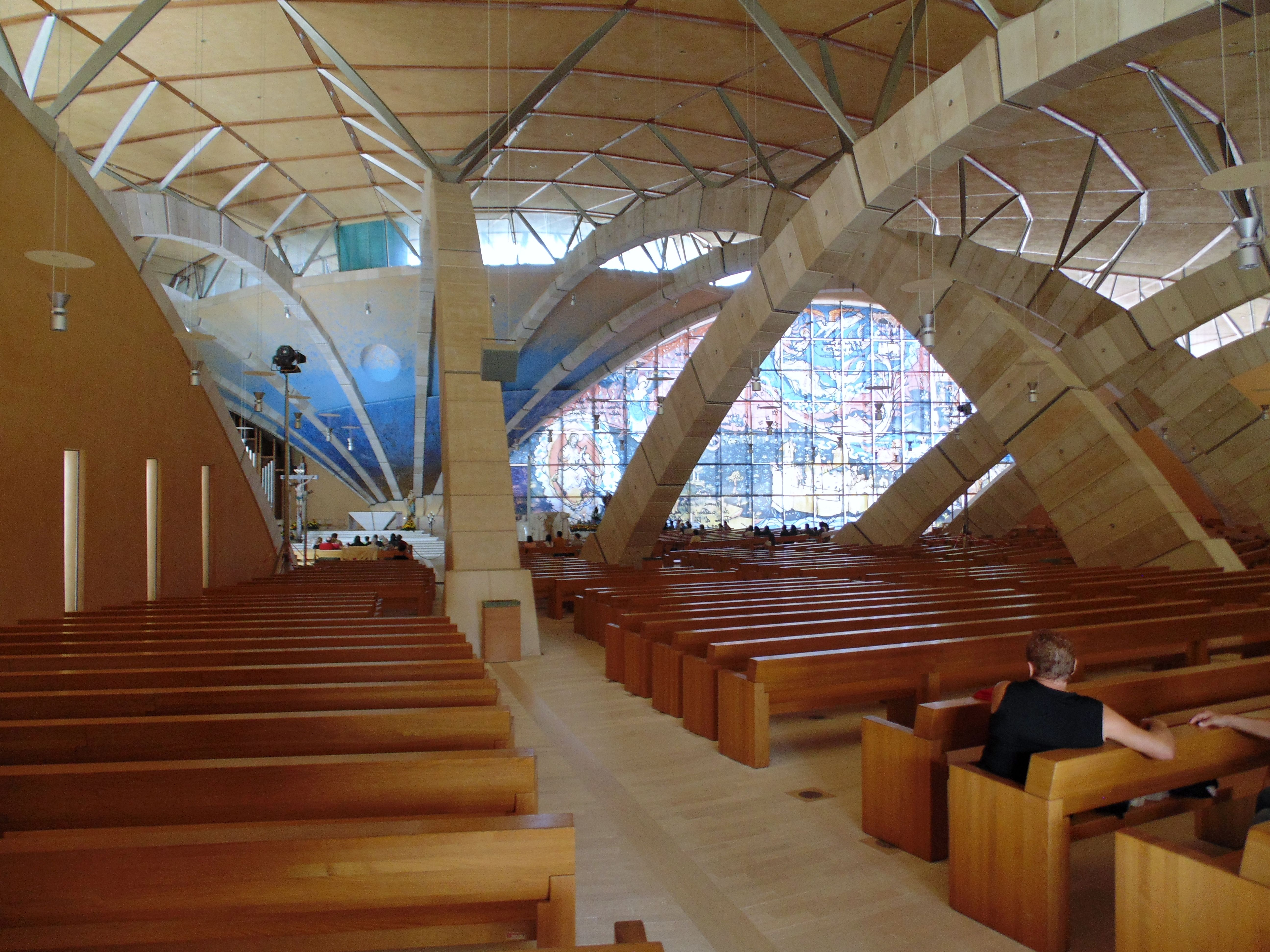 71013 San Giovanni Rotondo, Province of Foggia, Italy